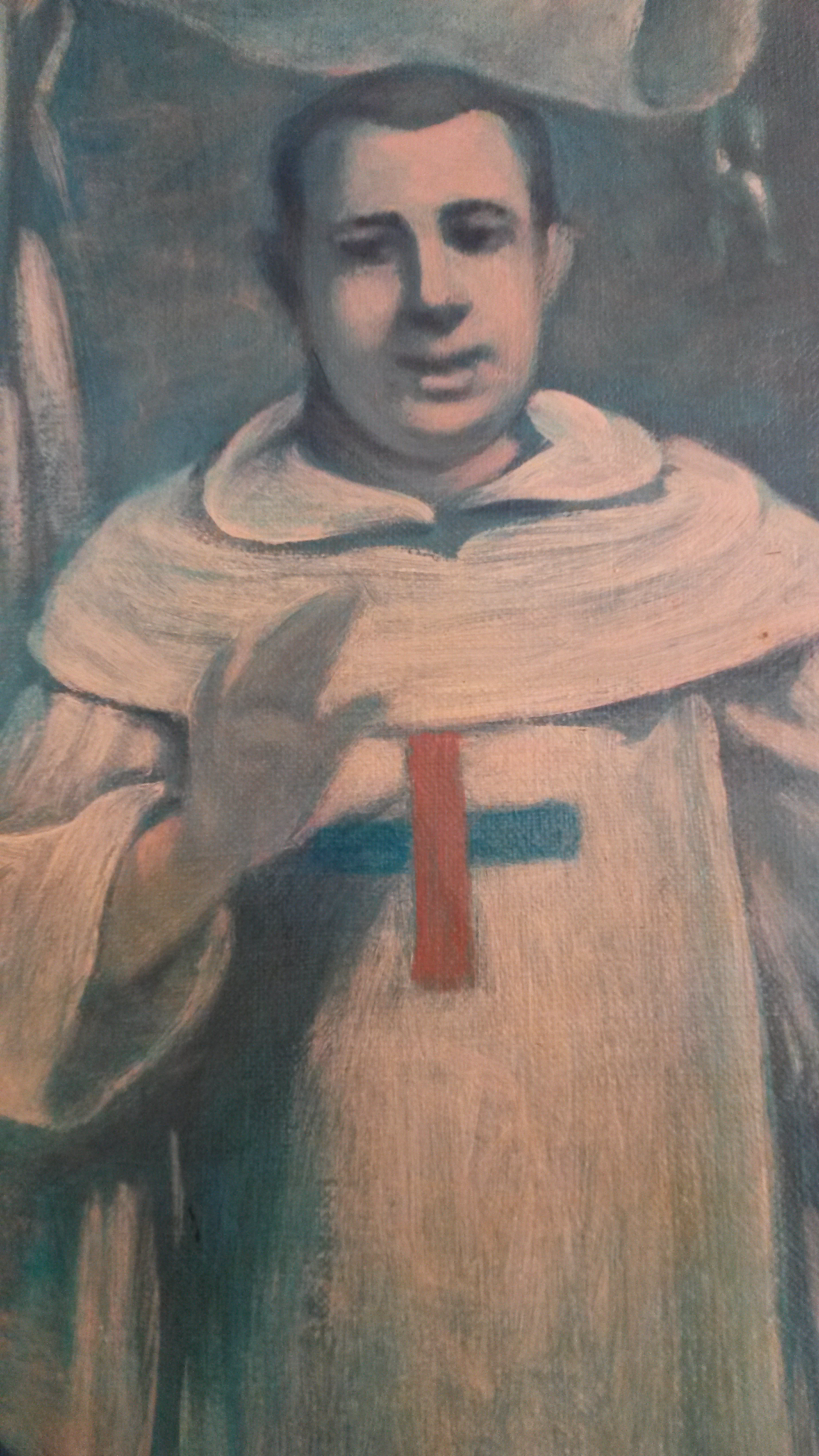 Particular del cuadro de San Hermenegildo de la Asunción y compañeros mártires que se venera en la iglesia de San Carlino alle quattro Fontane de Roma.